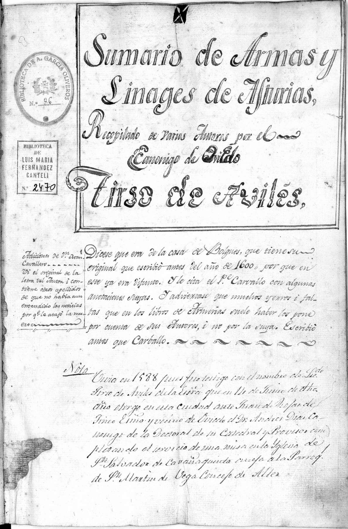 Primera hoja de una copia